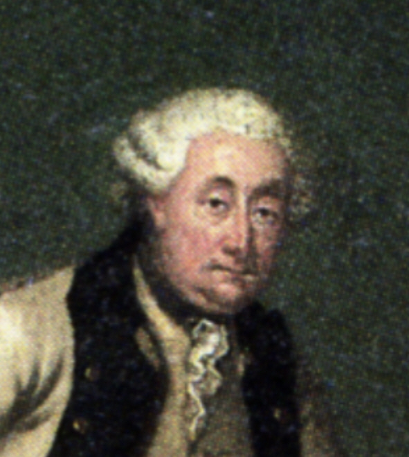 Robert Scipio von Lentulus (* 18. April 1714; † 26. Dezember 1786), schweizerischer Offizier in preußischen Diensten. Ausschnitt aus einem zu Lebzeiten entstandenen Gemälde.